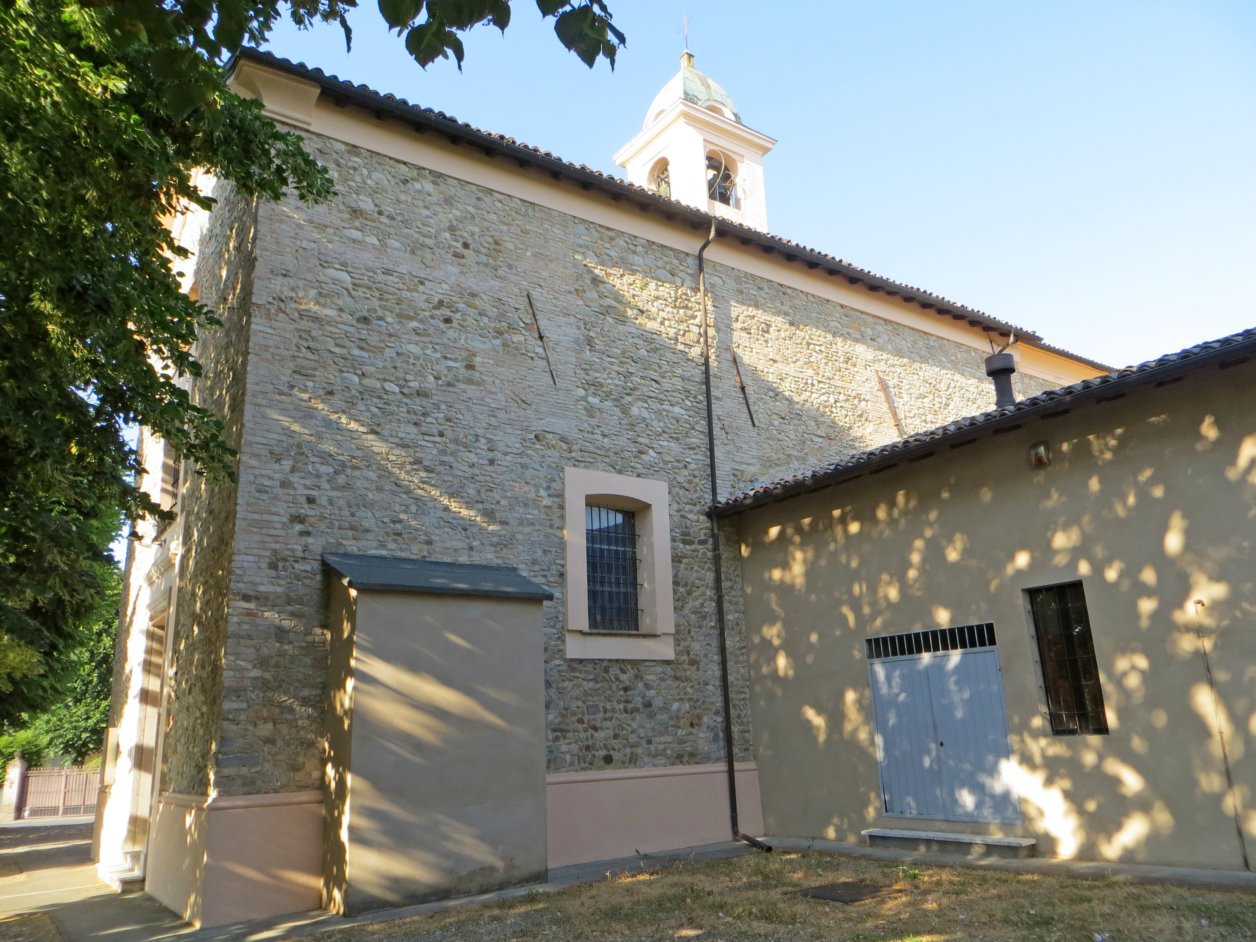 Chiesa di San Martino (Malandriano, Parma) - lato sud